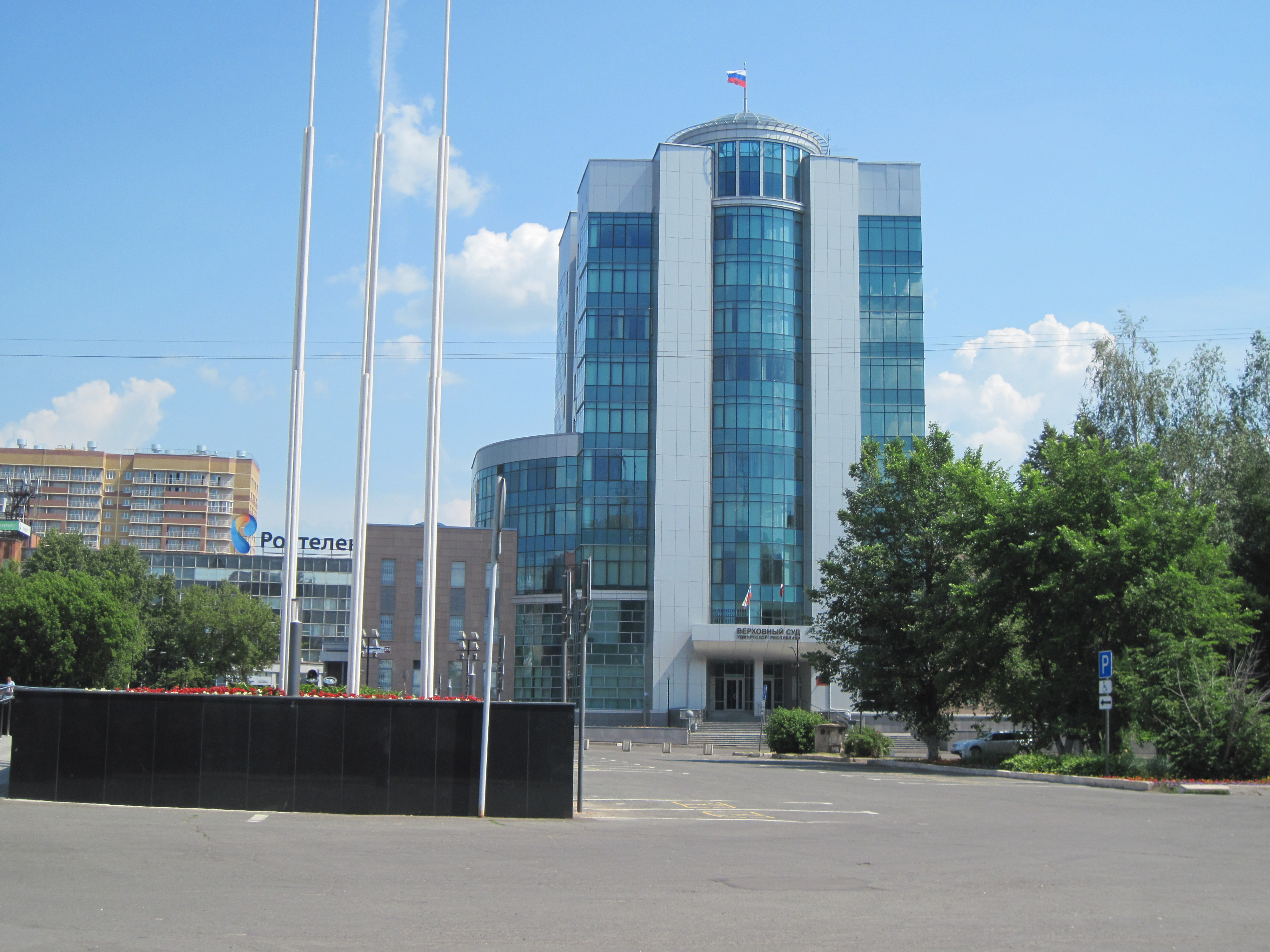 Здание Верховного суда Удмуртской Республики